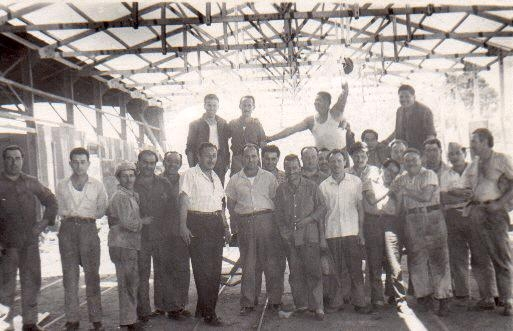 Trabajadores del Ferrocarril Midland, c. 1955.